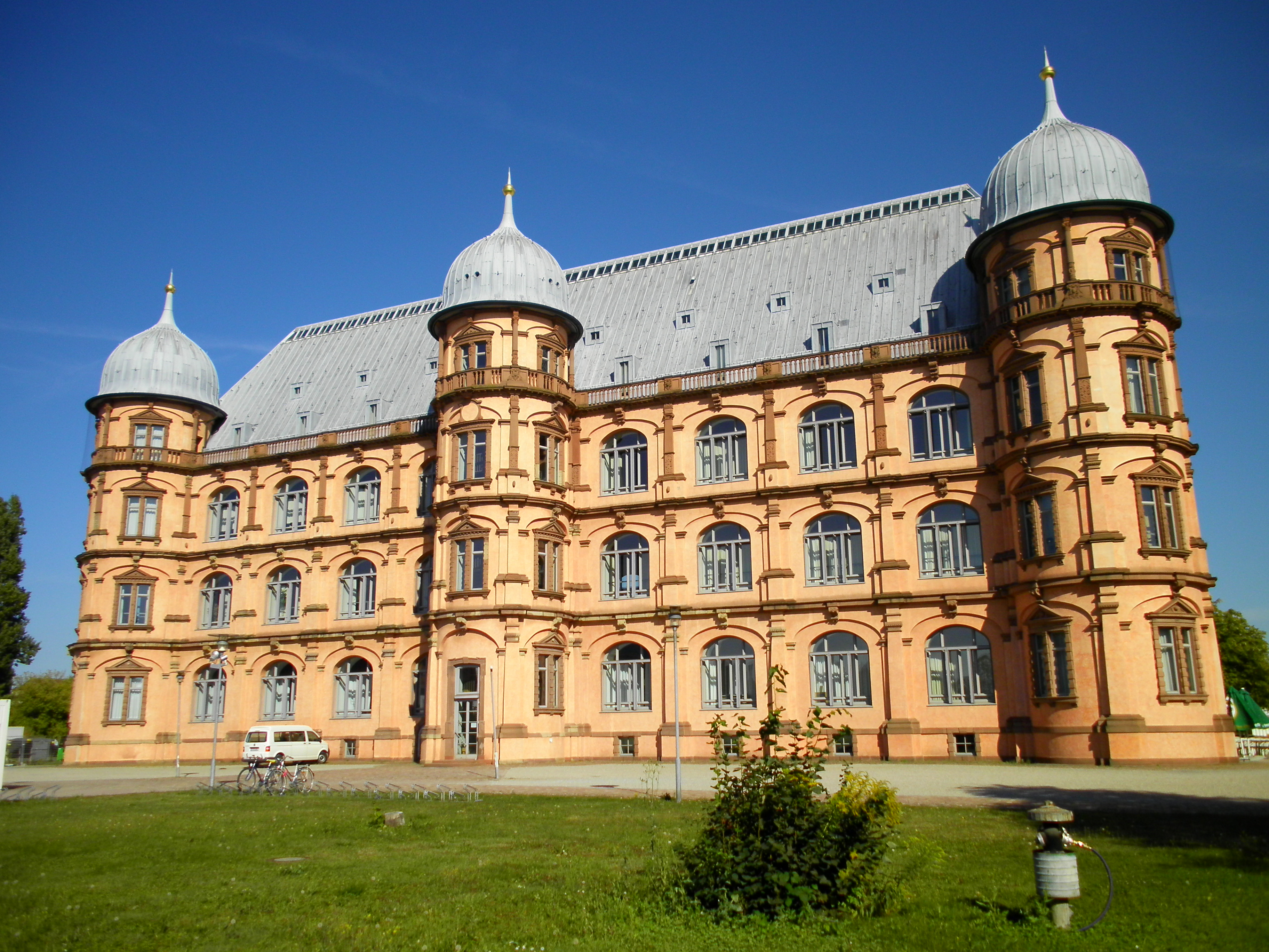 Schloss Gottesaue, Karlsruhe